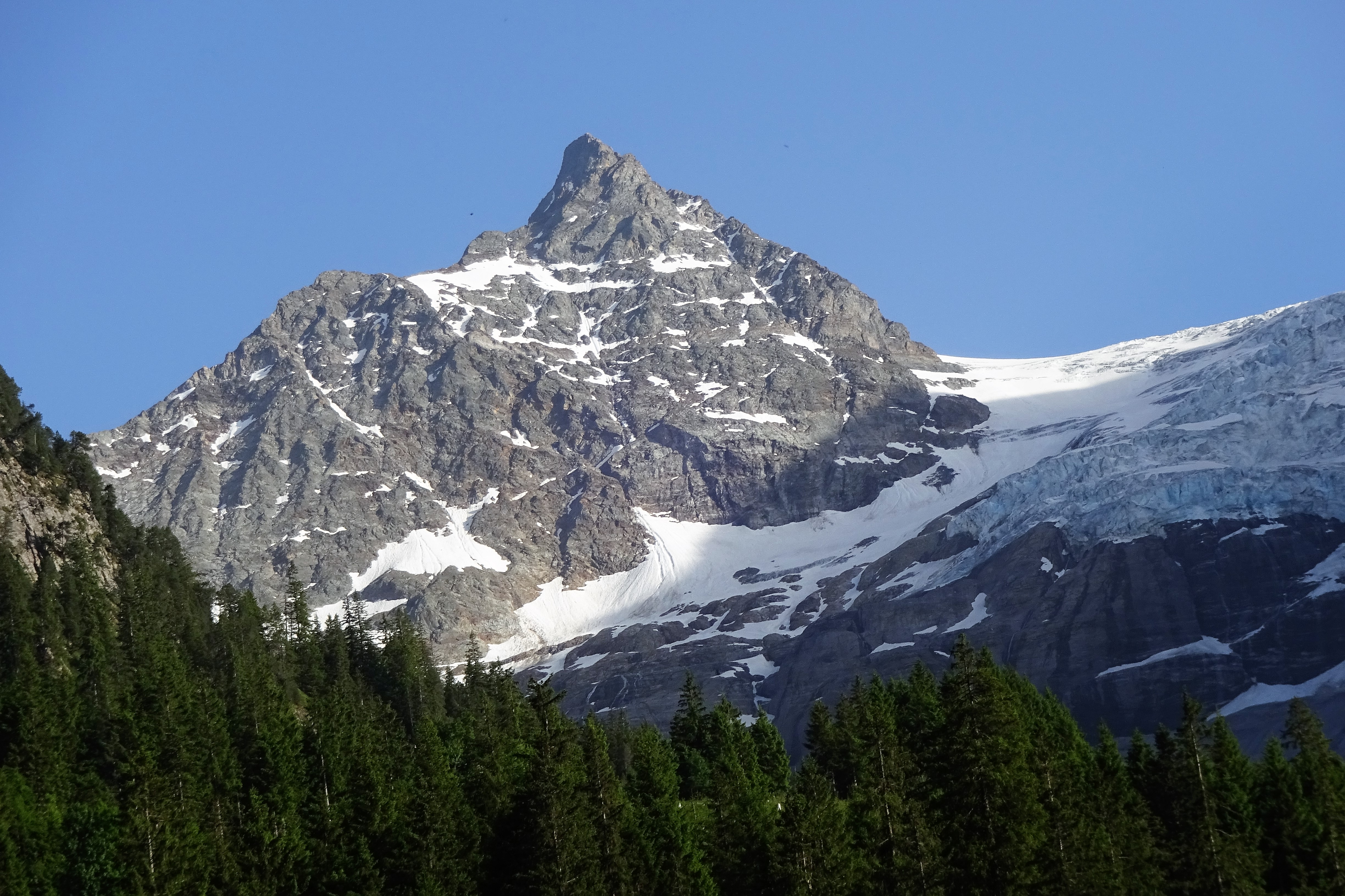 Dossenhorn/Tossen mit Rosenlauigletscher von Nordnordwesten: Nordwestflanke (Dossenwand) & Nordgrat (Dossengrat) – Aufnahmestandort: Rosenlauital/Rychenbachtal (Gemeinde Schattenhalb BE), Gschwantenmad, Scheideggstrasse (Postauto-Linie 164 Meiringen-Schwarzwaldalp) – 46.68773 N, 8.16098 E; 1303 m